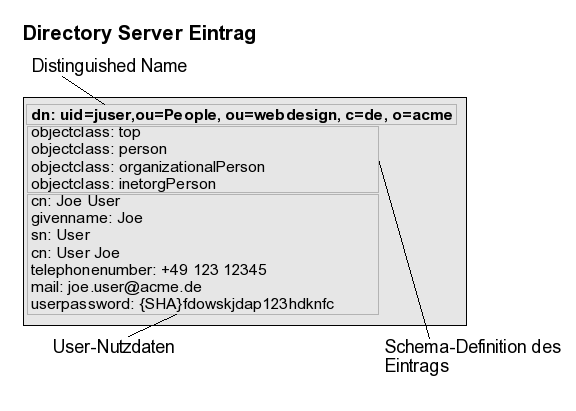 Beschreibung eines LDAP-Eintrages